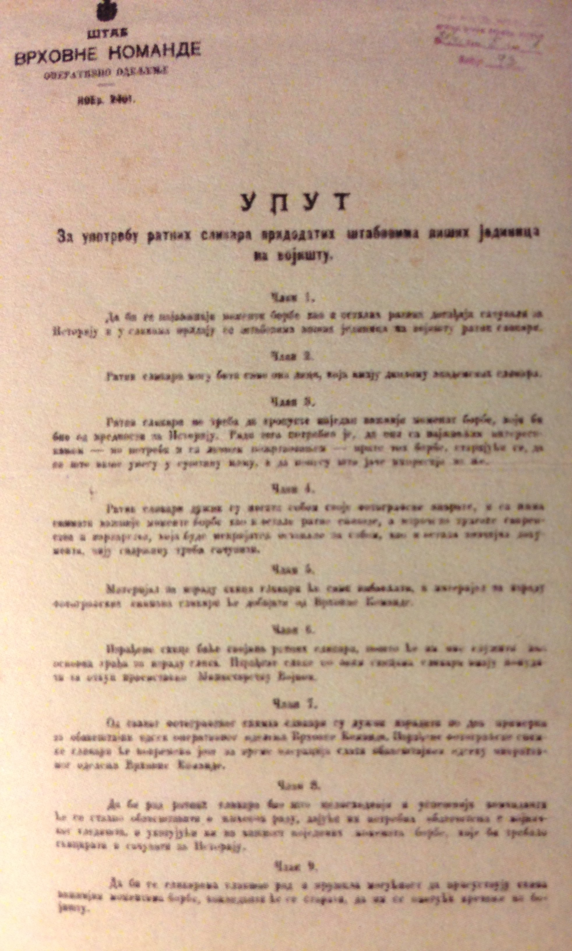 Српски (ћирилица): „Упут за кориснике ратних сликара придодатих штабовима виших јединицана војишту”, са ознаком број 2401 које је штампано је у Ваљеву 20. августа 1914. године.